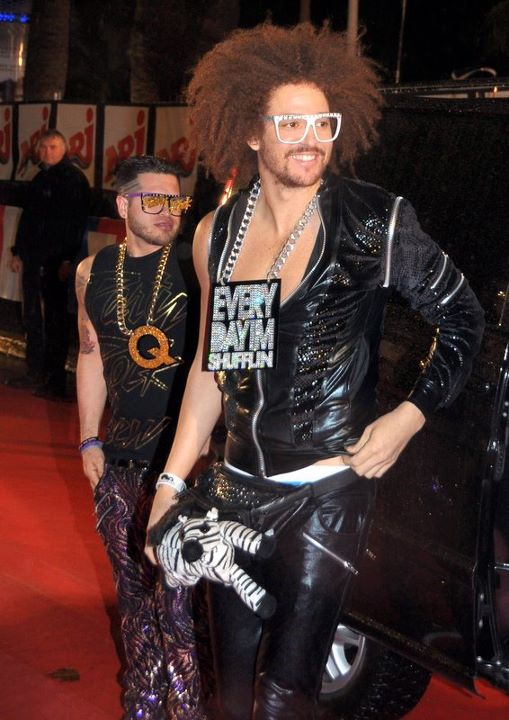 LMFAO aux NRJ Music Awards